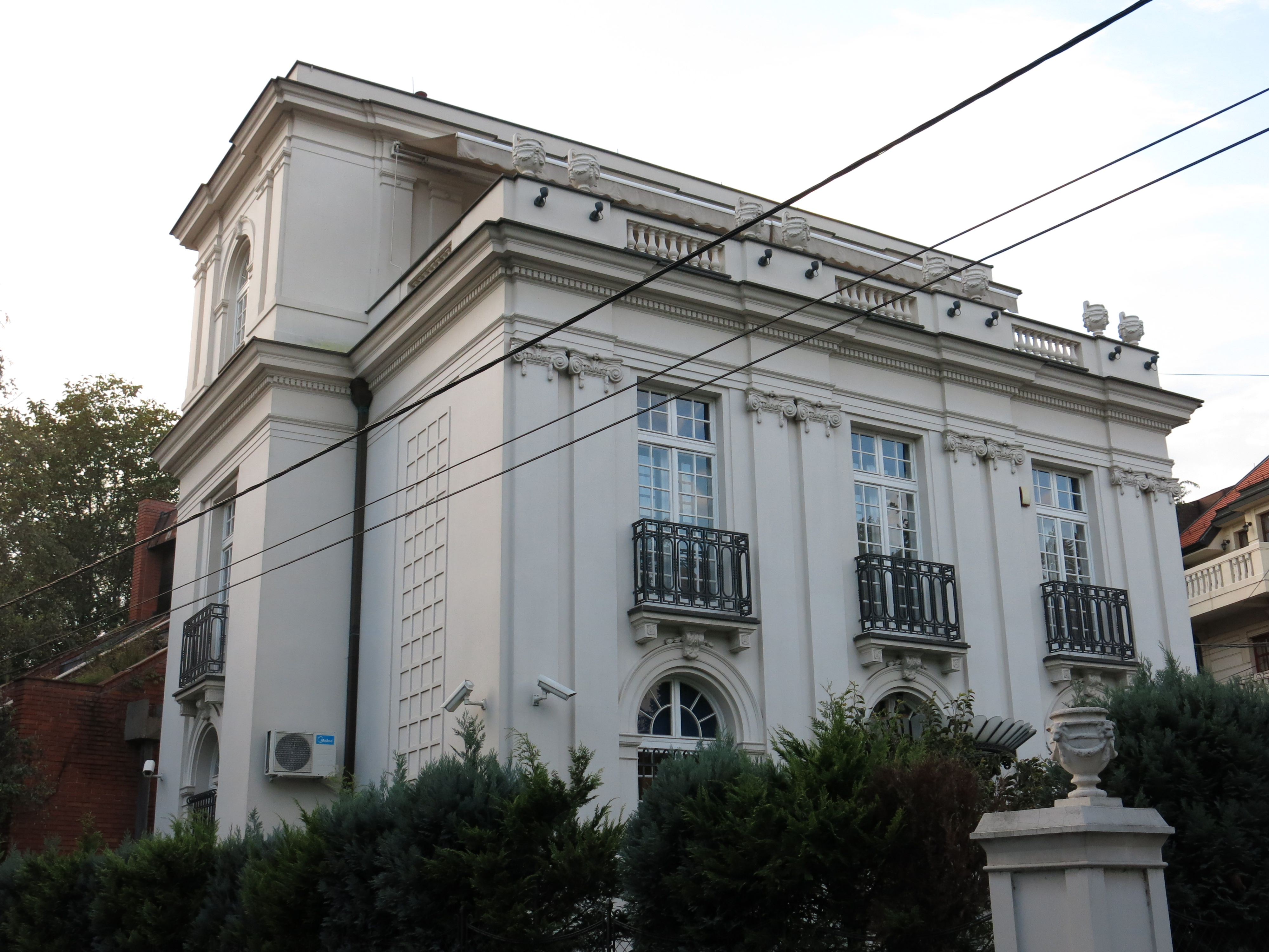 Кућа Флашар у Београду